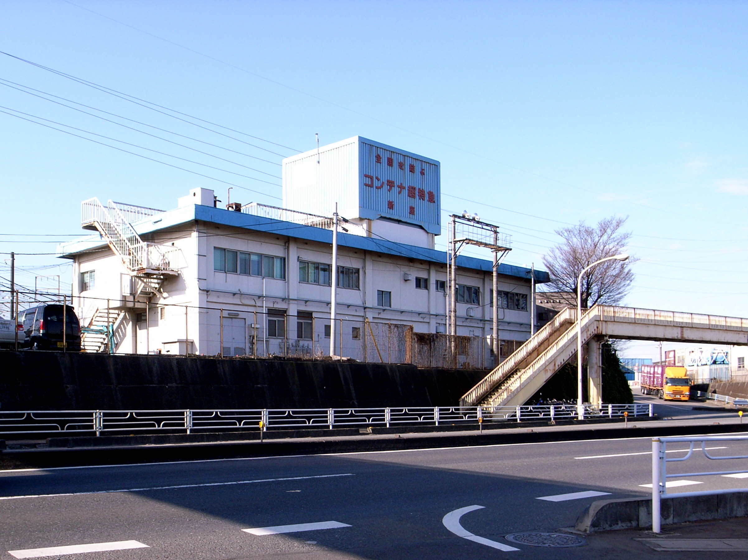 武蔵野線新座貨物ターミナル駅事務所